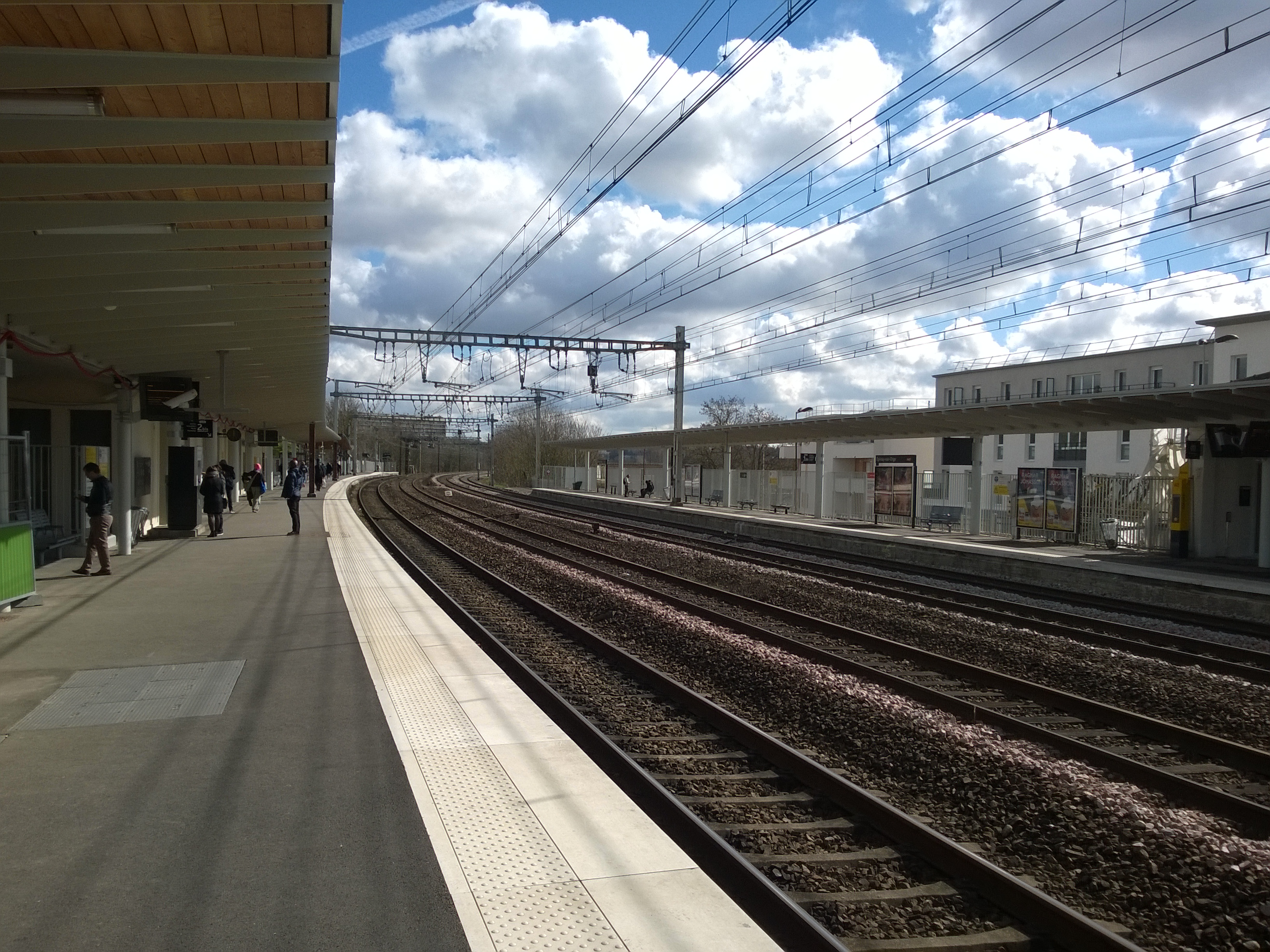 Depuis le quai pour Paris de la gare d'Épinay-sur-Orge, vue, de gauche à droite, sur la majeure partie du quai pour Paris, les voies de la ligne classique et une partie du quai pour Brétigny.